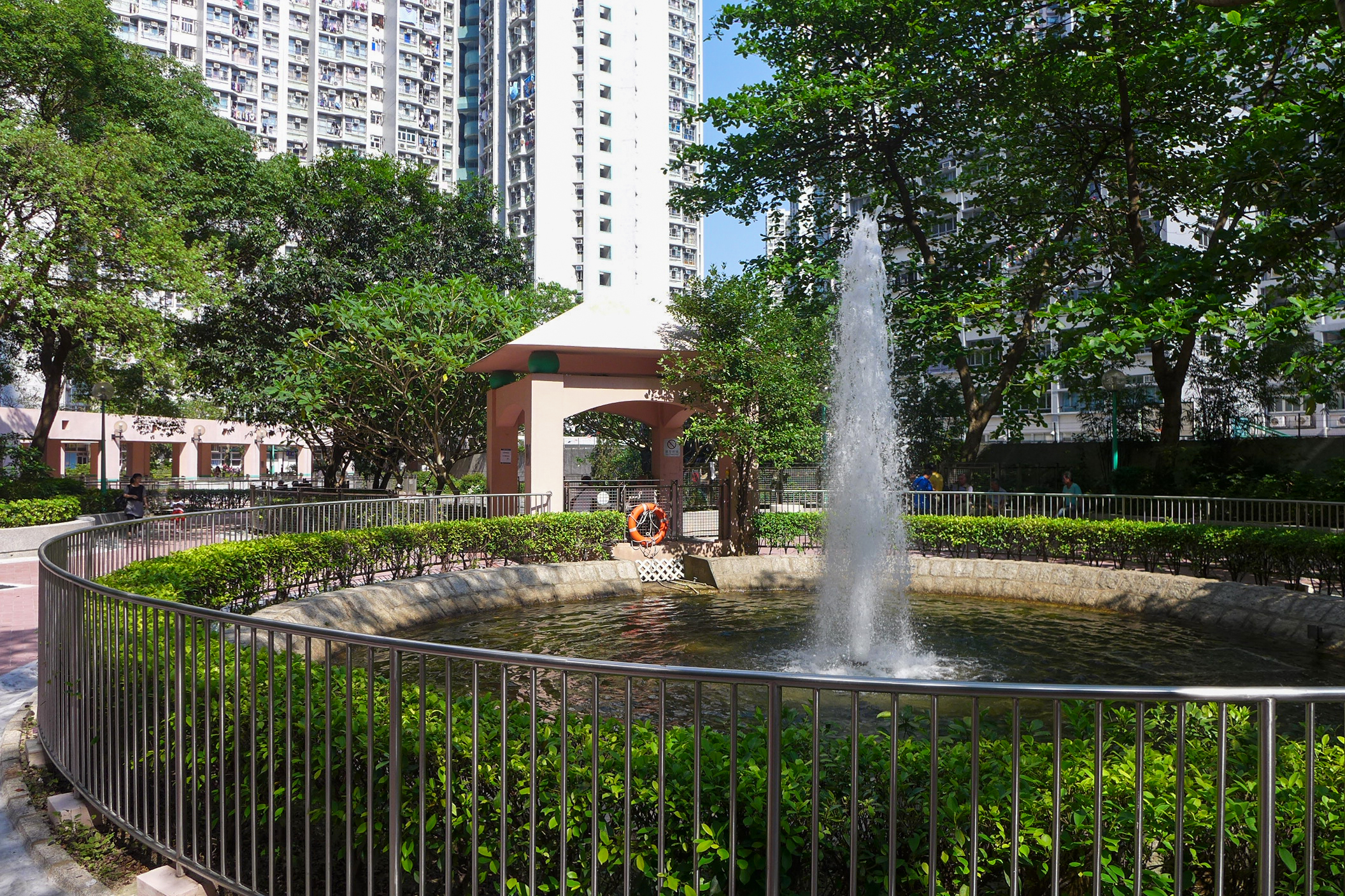 Hau Tak Estate Fountain